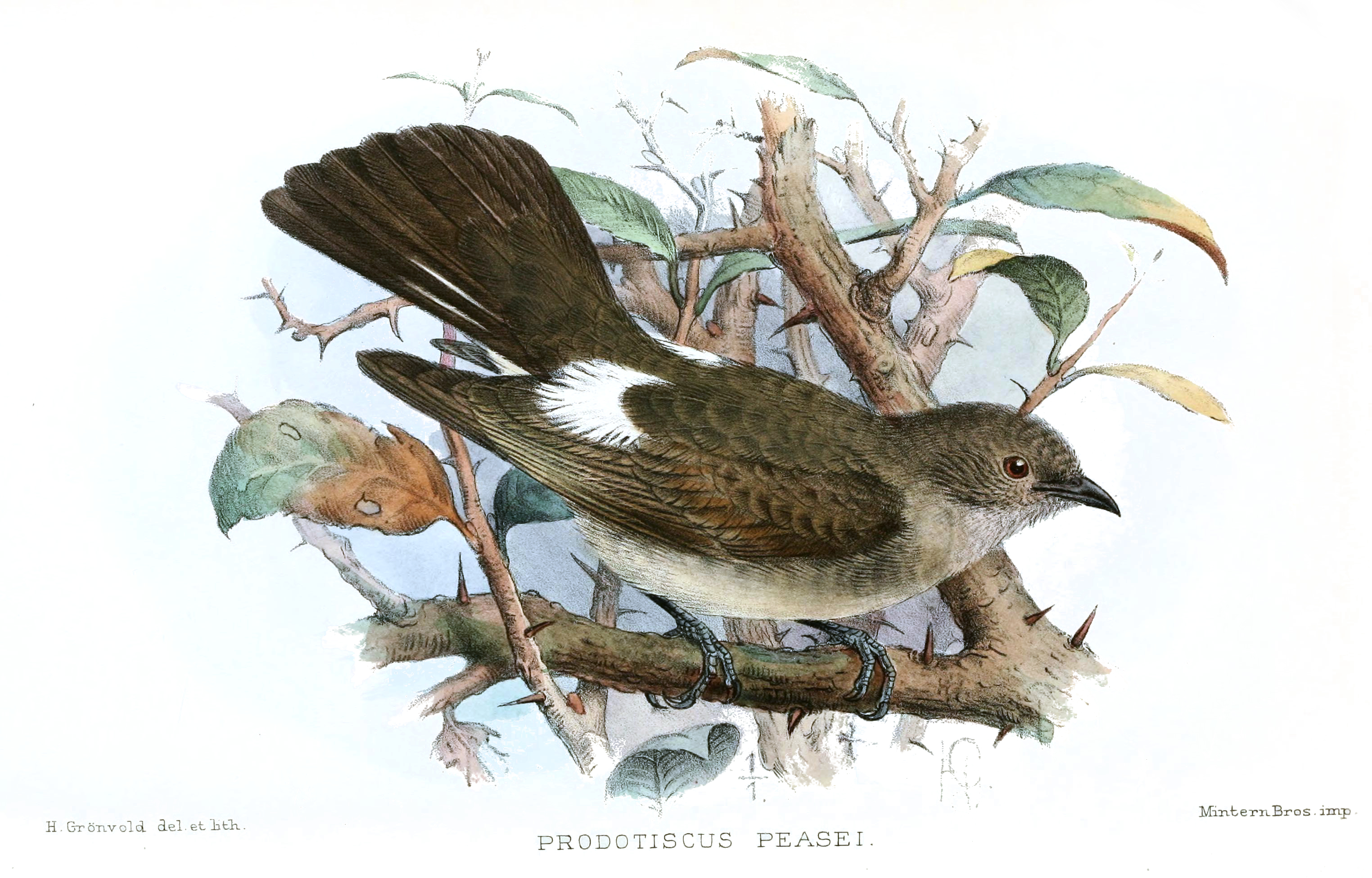 Prodotiscus peasei (s Ethiopia) = Prodotiscus regulus subsp. regulus Sundevall, 1850